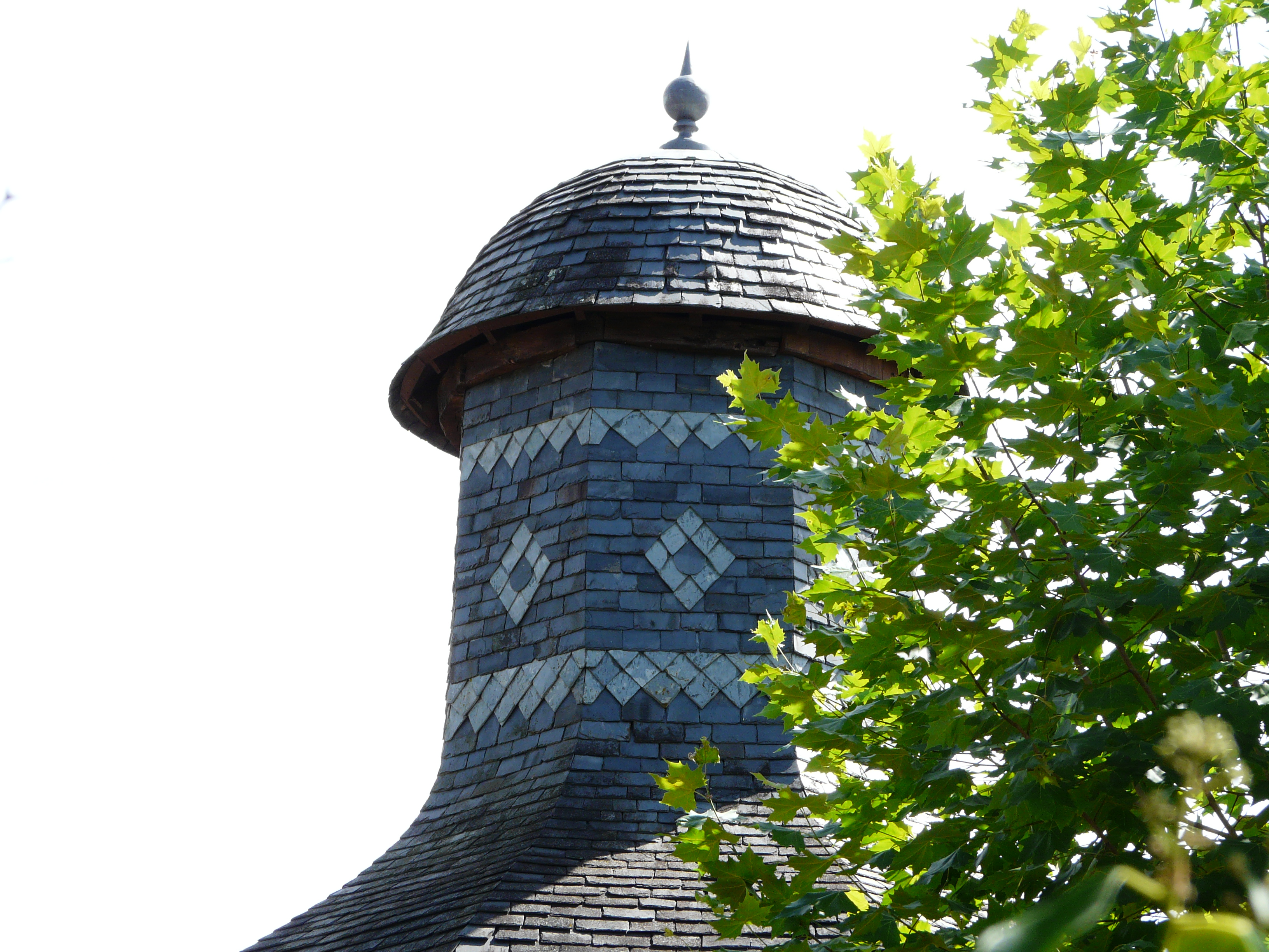 Le sommet du pigeonnier du château de la Chapoulie, Peyrignac, Dordogne, France.